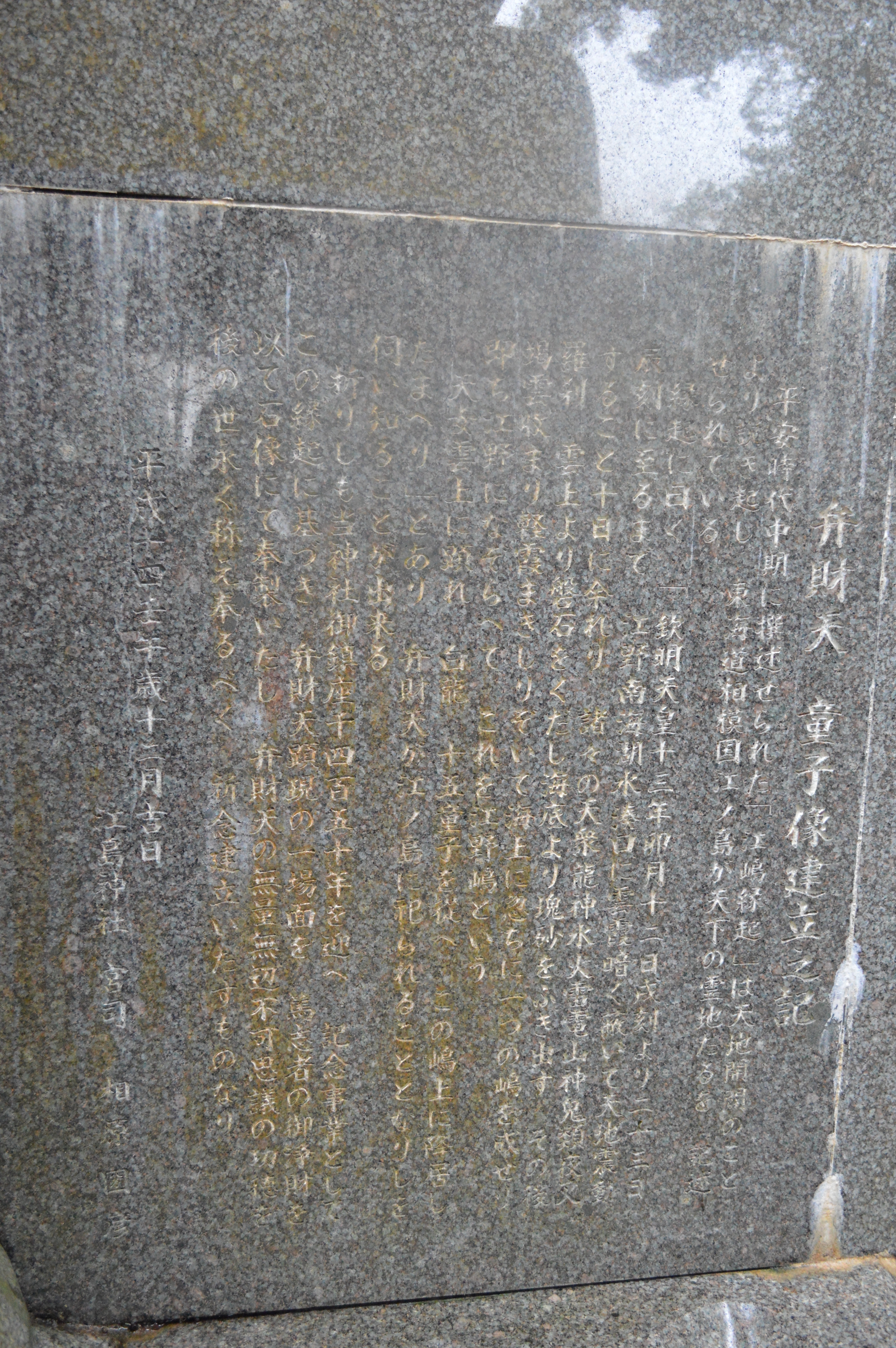 弁財天童子像建立之記 (江島神社)